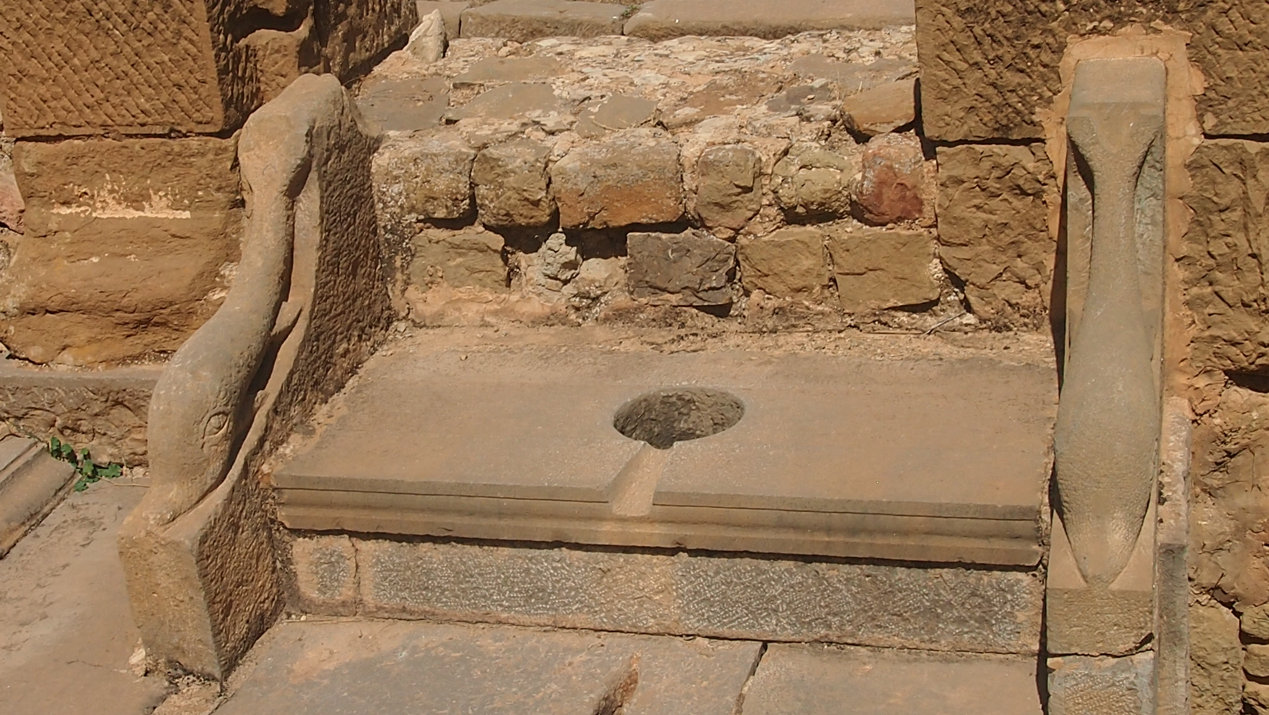 Territoires et monuments de l'antique Thamugadi.